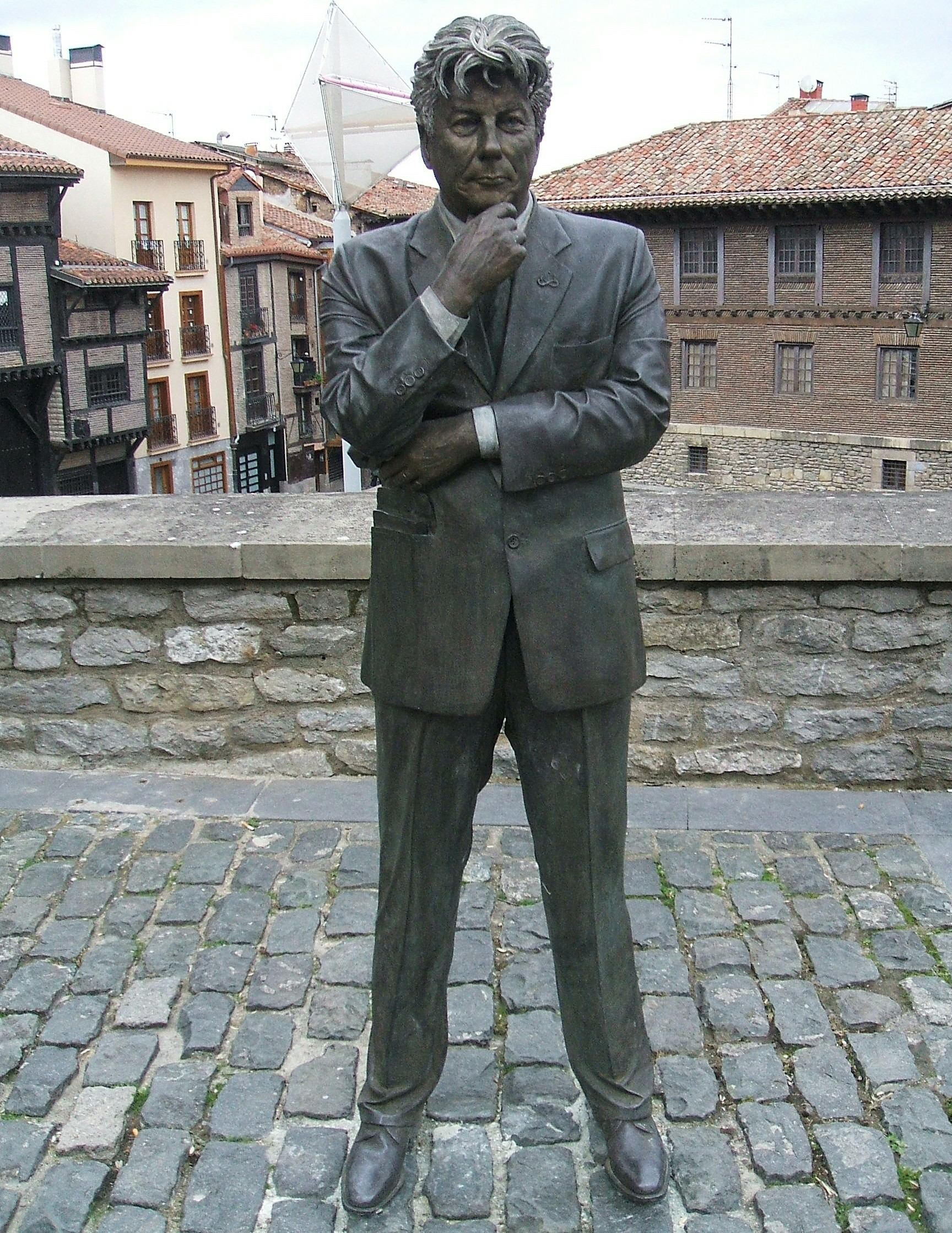 Estatua en bronce dedicada al novelista Ken Follett, obra del escultor Casto Solano, inaugurada en enero de 2008, con motivo de la visita del autor, en la Plaza de la Burullería, al pie de la Catedral gótica de Santa María (Catedral Vieja), en Vitoria-Gasteiz, País Vasco, España/Spain